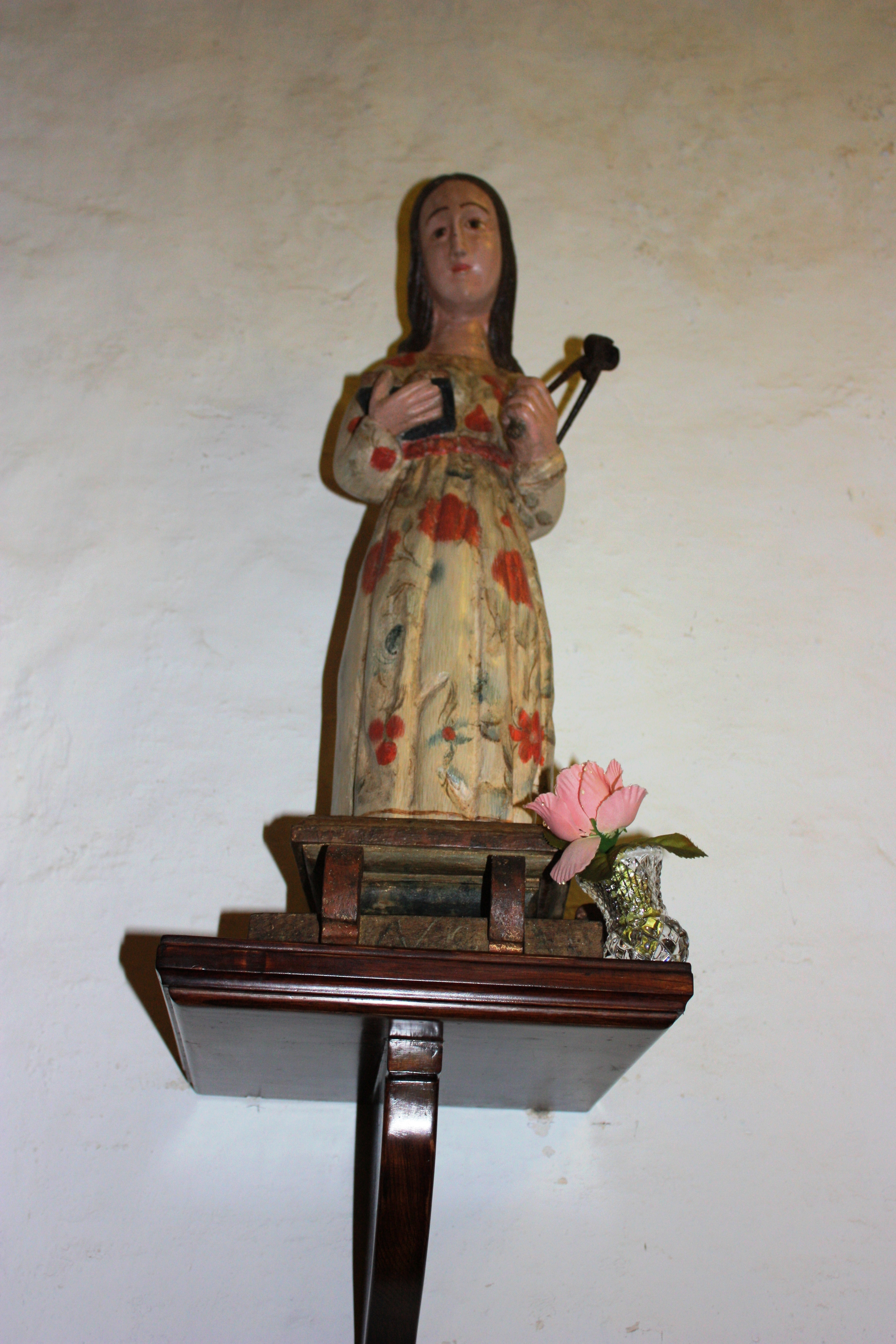 Santuario de Contrueces-Gijón